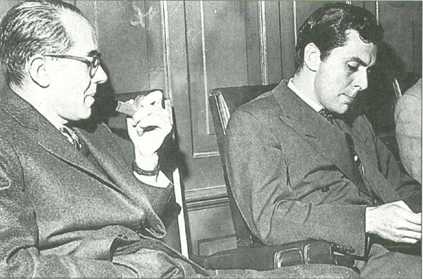 Alvaro Uribe Rueda